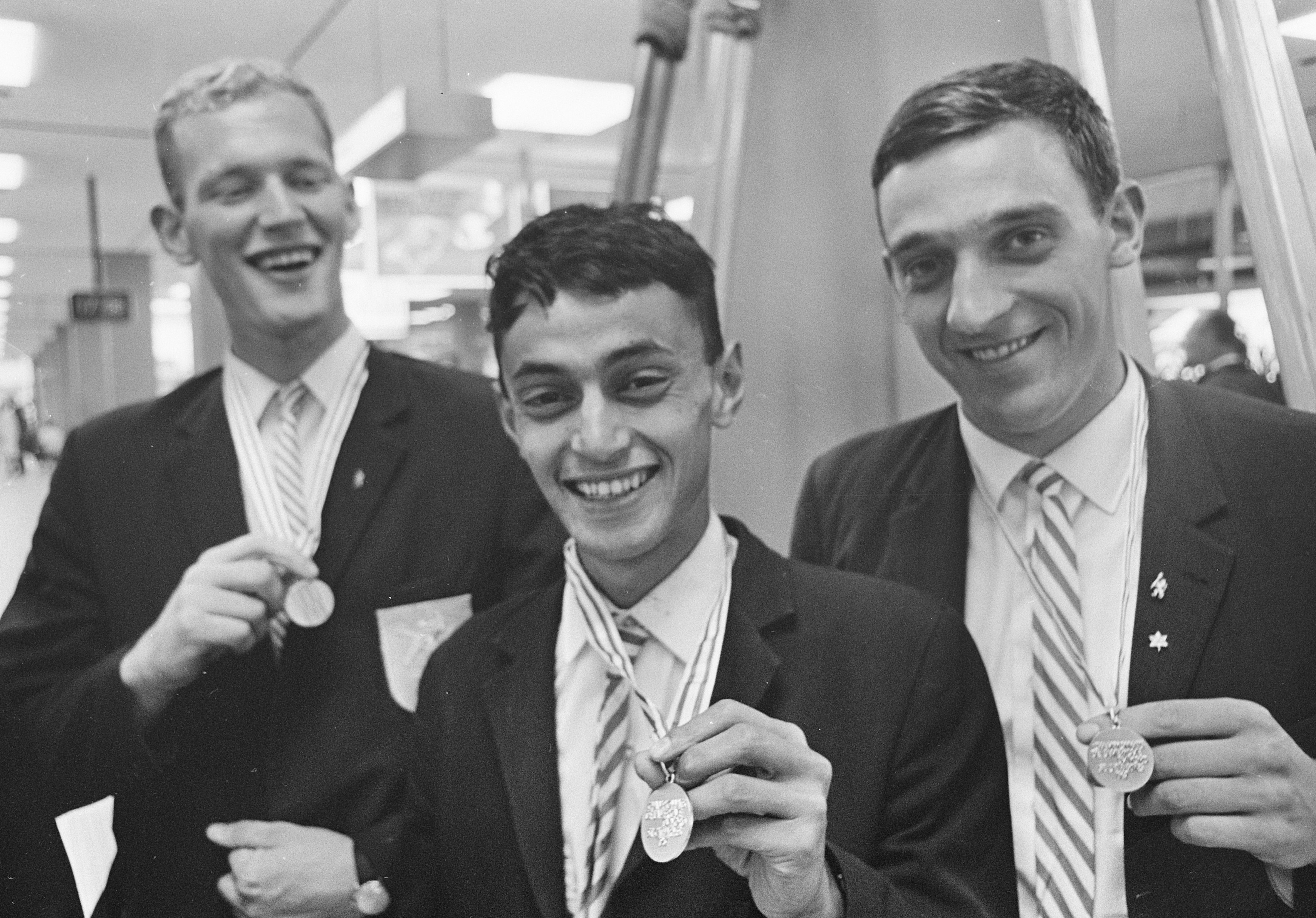 Aankomst roeiploeg op Schiphol. Van Nes (stuurman), Reinders en Suselbeek